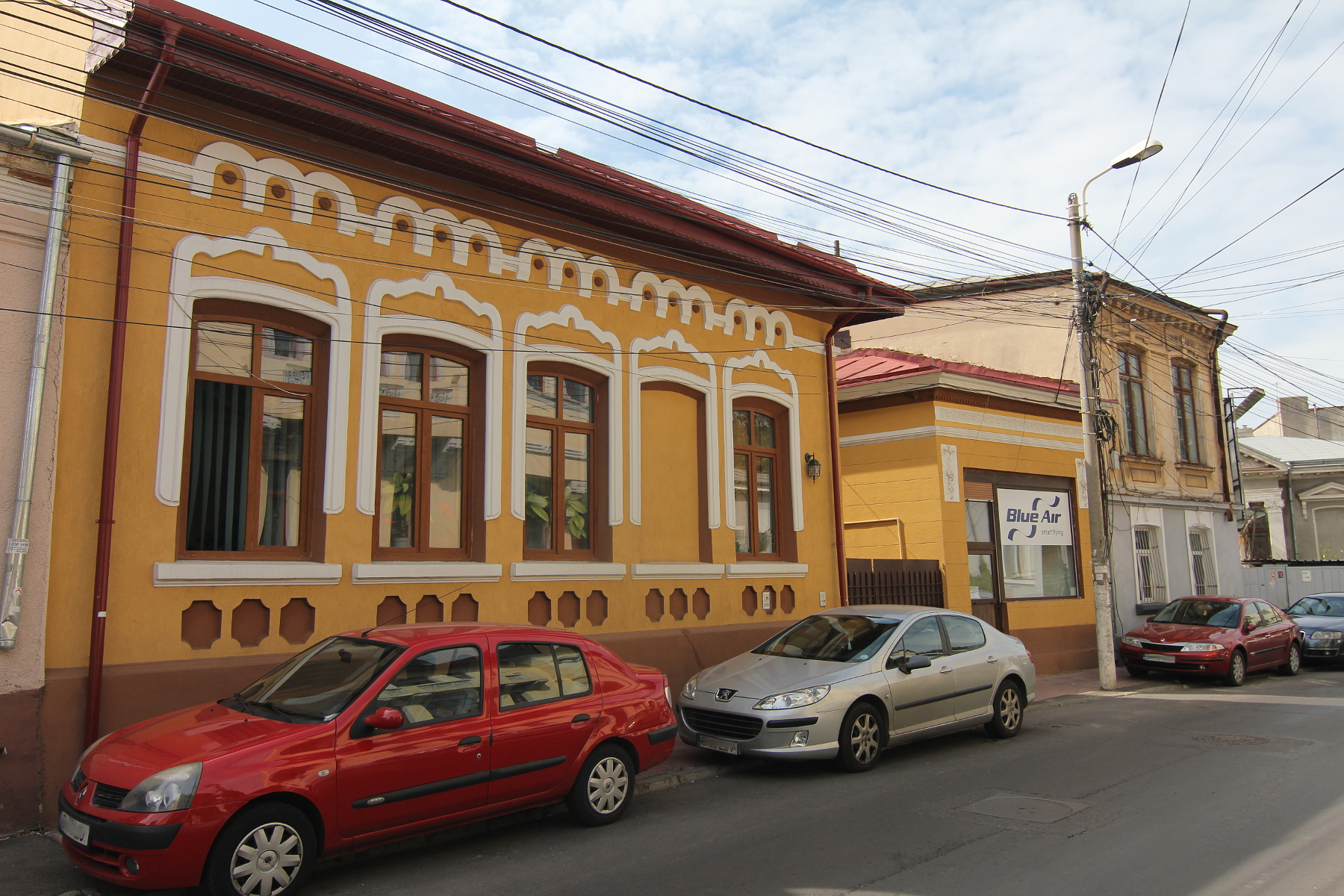 Casă pe Str Robescu